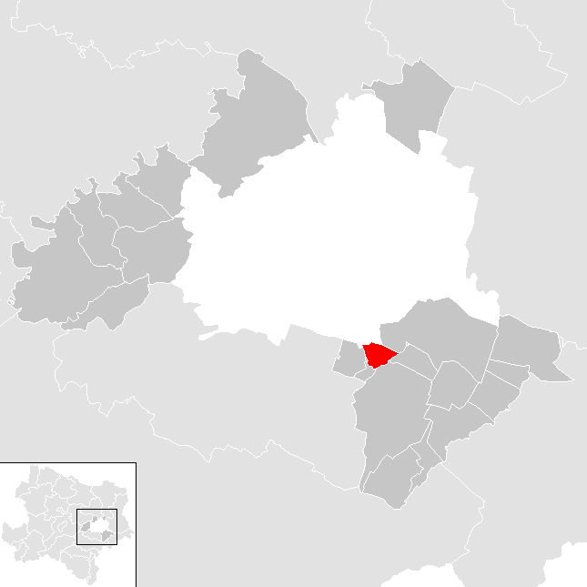 Bezirk Wien Umgebung